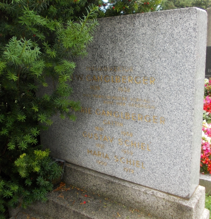 Johann Wilhelm Ganglberger-Wiener Zentralfriedhof (33A-1-17)